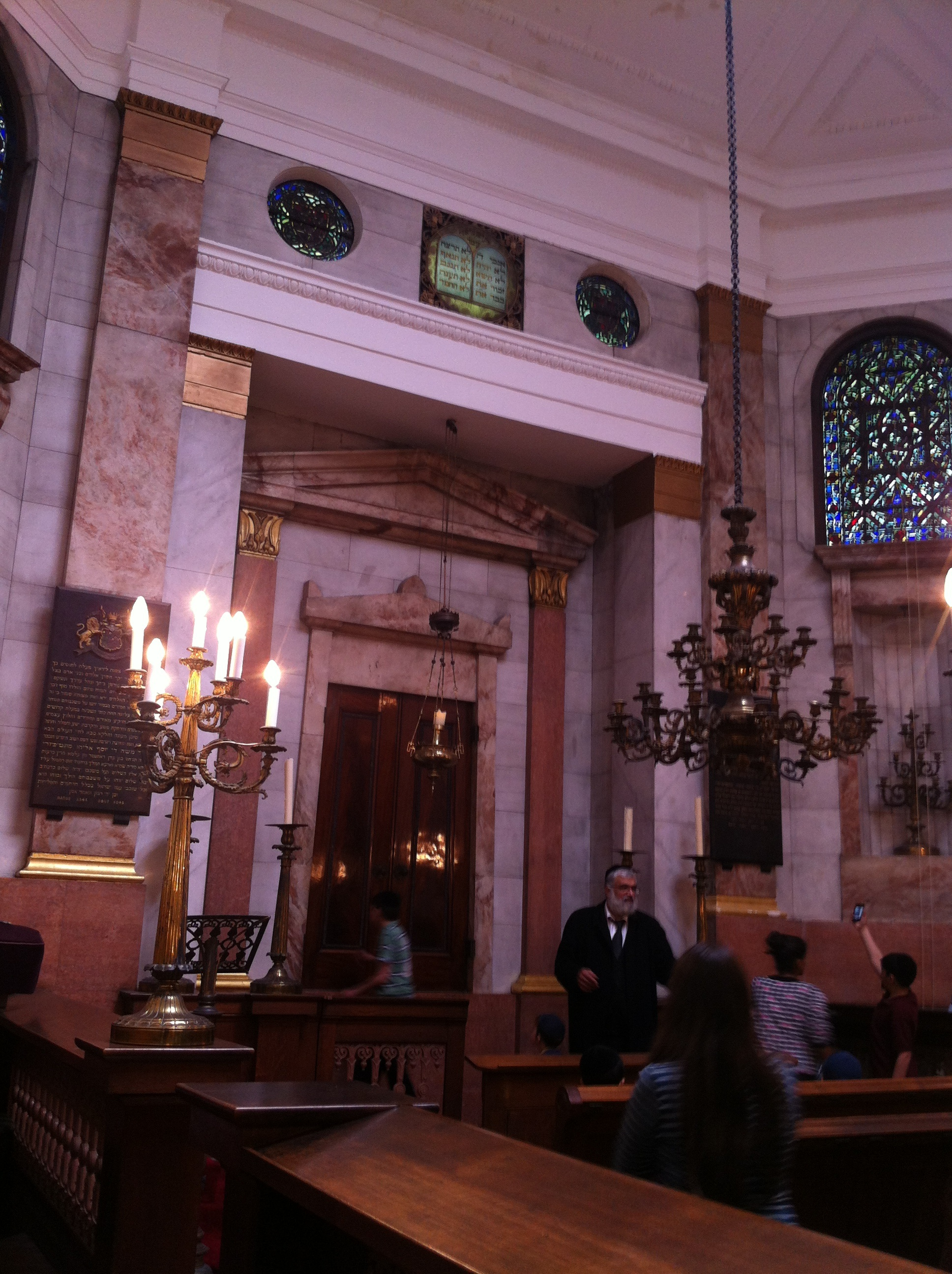 היכל בית כנסת ר משה מנטיפיורי ראמסגייט